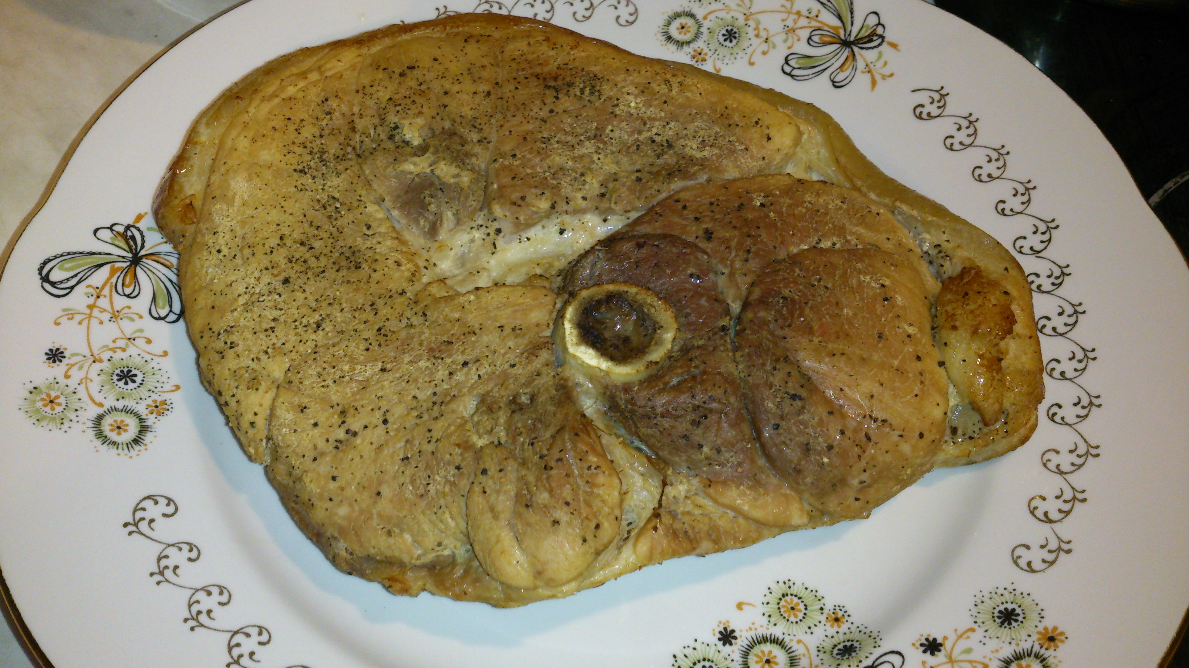 Lahtilõikamata seapraad, kondiga